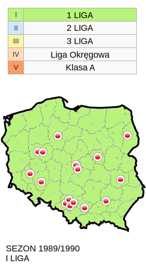 Jagiellonia w sezonie 1989/90 mapa